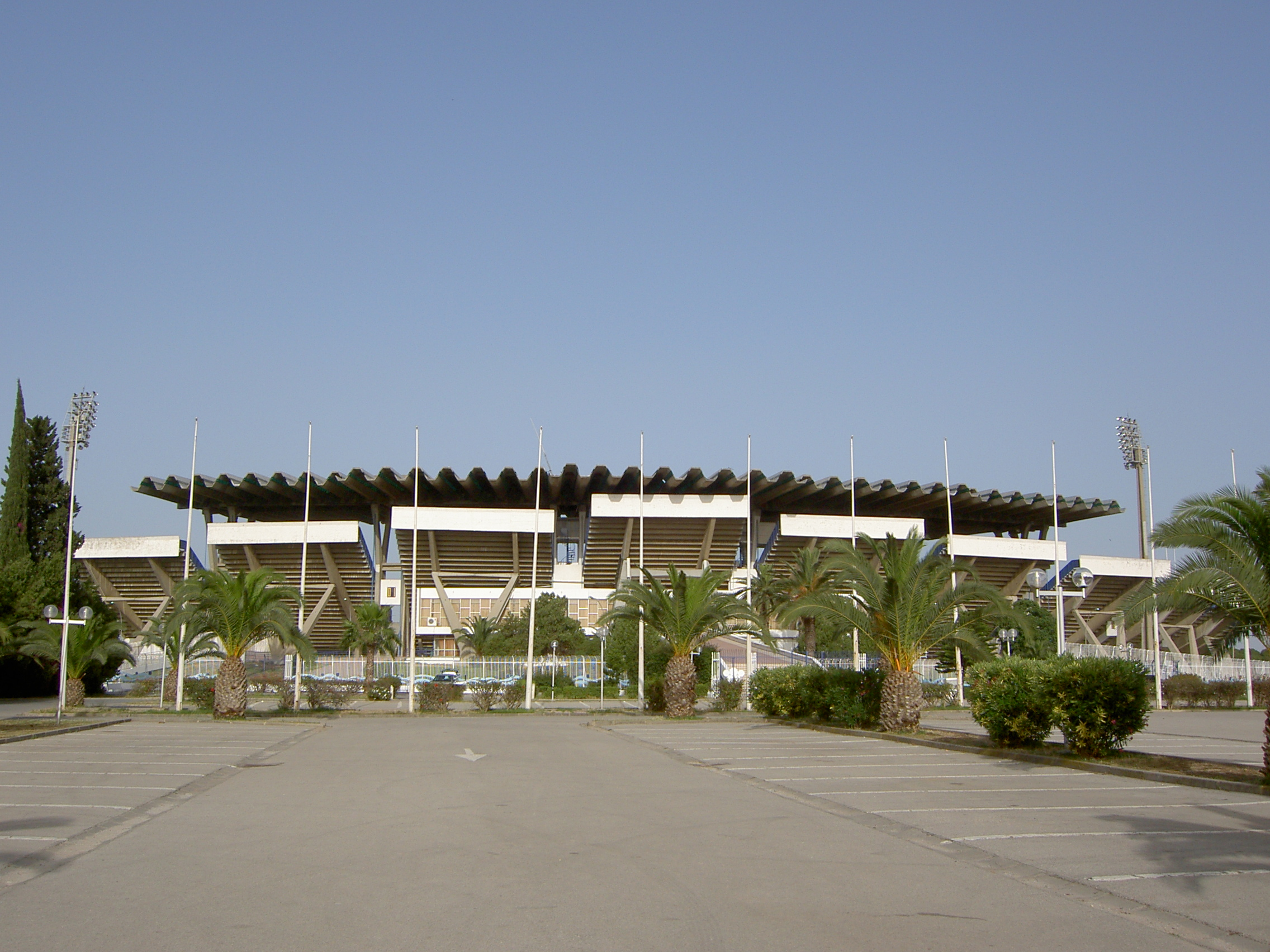 El Menzah Stadium, El Menzah, Tunis, Tunisia